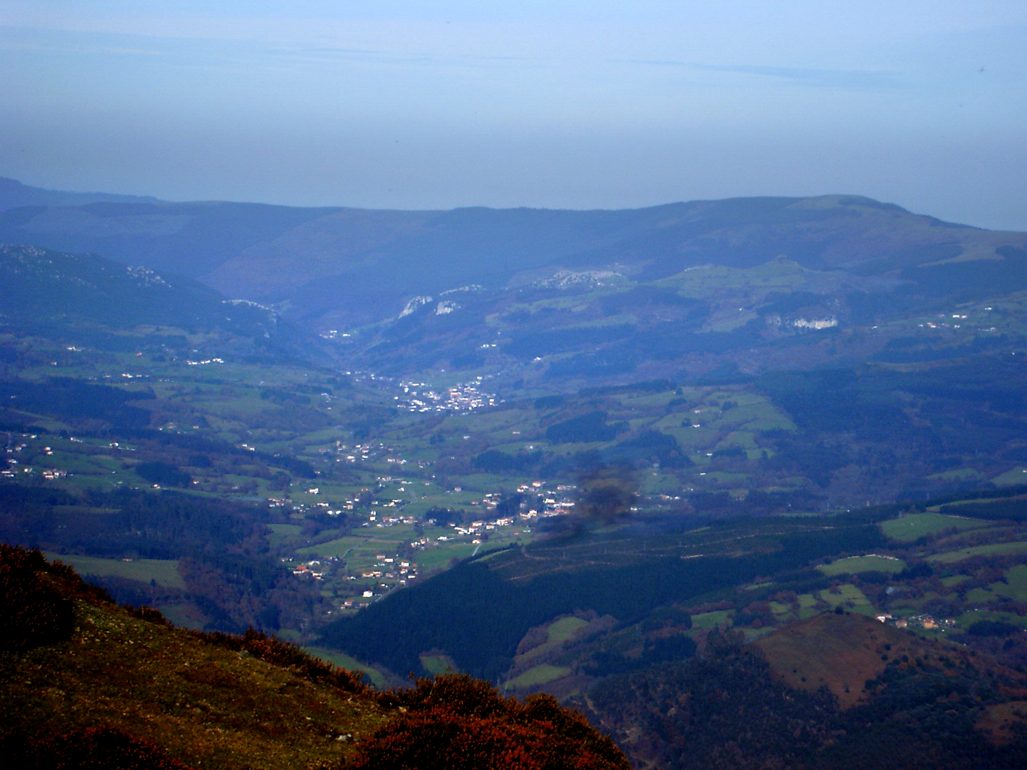 Turtzioz bailara